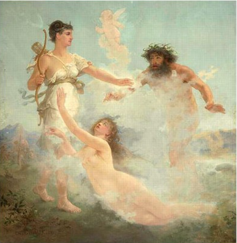 La Nymphe Arethuse